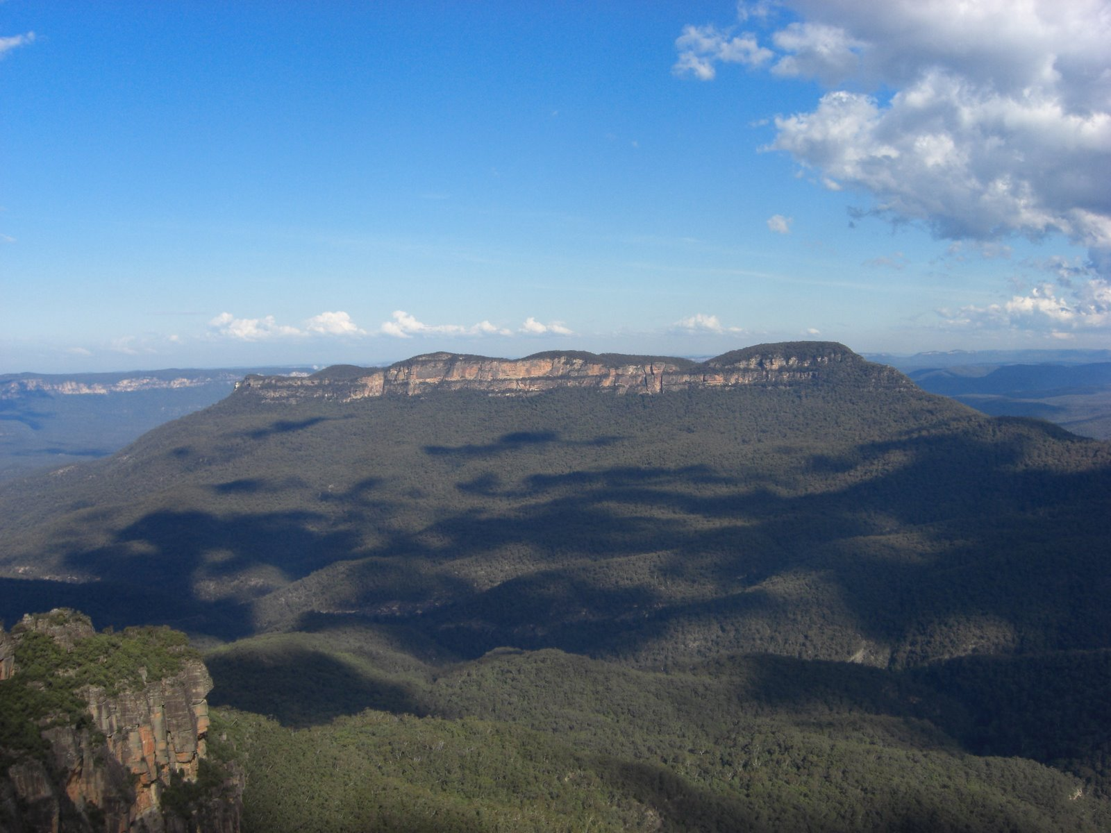 Les montagnes bleues en Australie